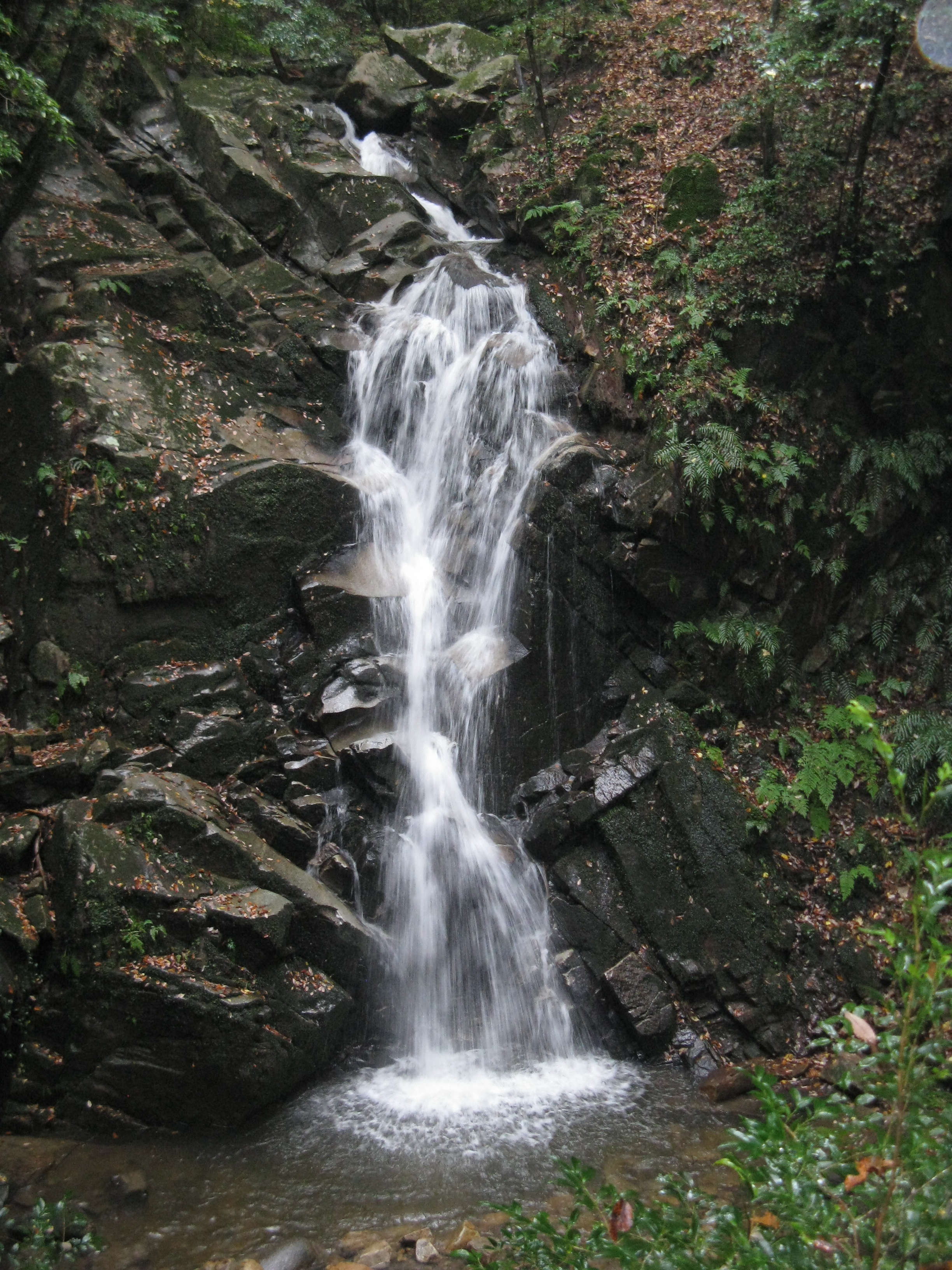 春日山原始林の鶯の滝